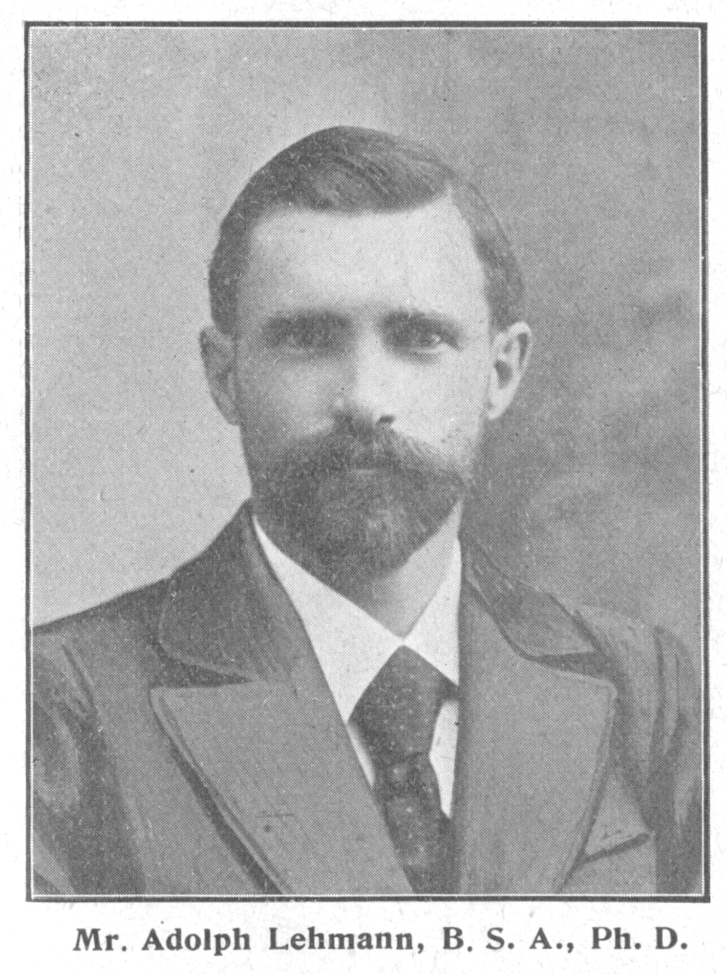 Adolph Lehmann